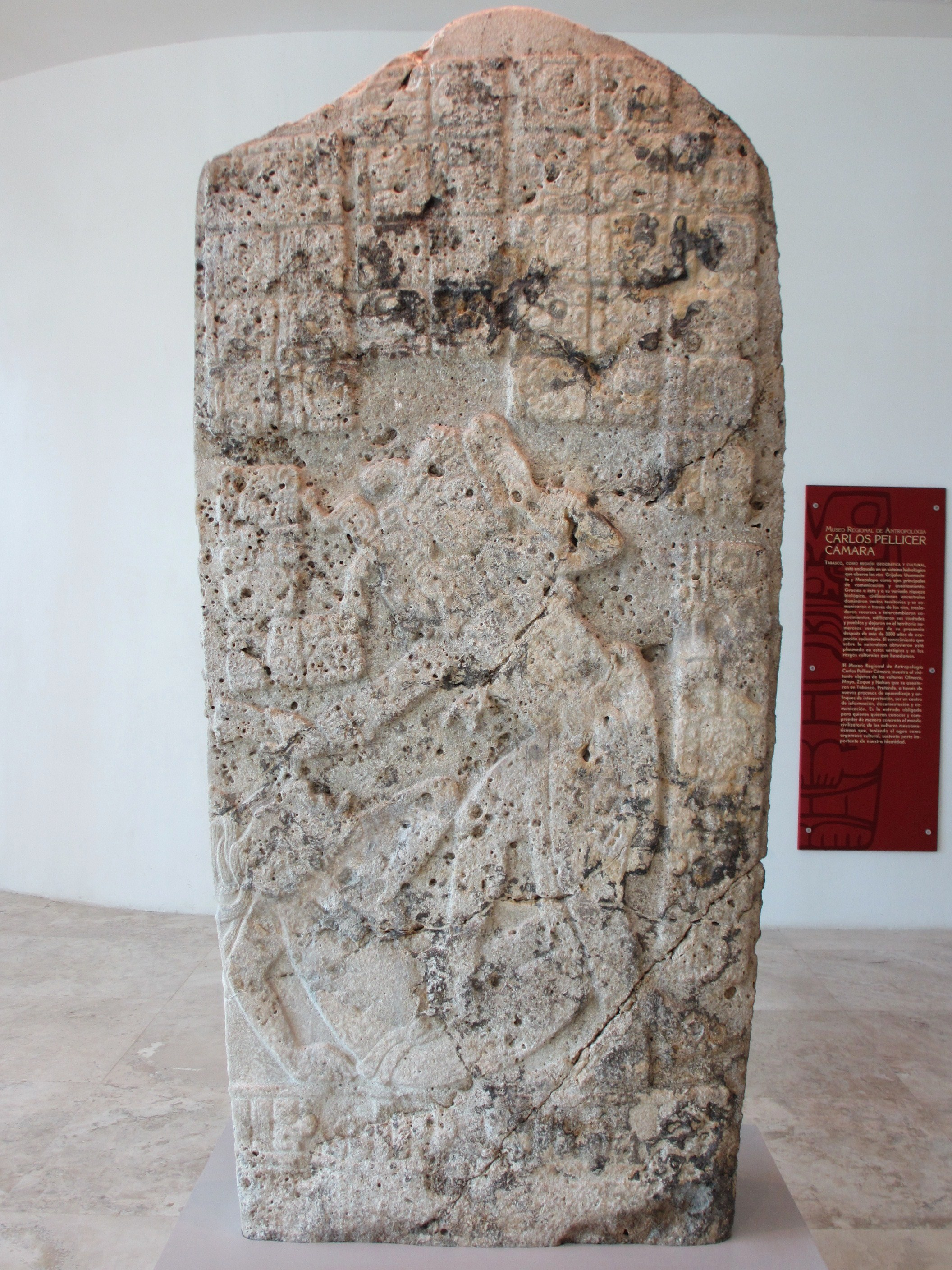 Cara posterior de la Estela 1 de Moral Reforma donde aparece un gobernante cuyo nombre no es legible, y que sería aliado o subordinado al rey de Moral Reforma, y se le ve golpeando a varios prisioneros. Museo Regional de Antropologia Carlos Pellicer Cámara. Villahermosa. Tabasco. México.